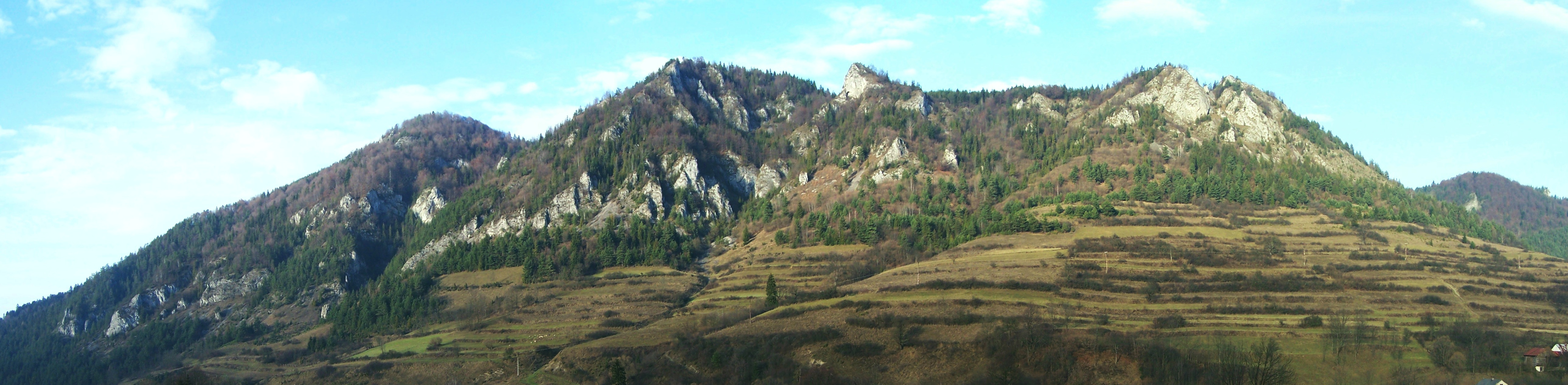 Haligowskie Skały - panorama